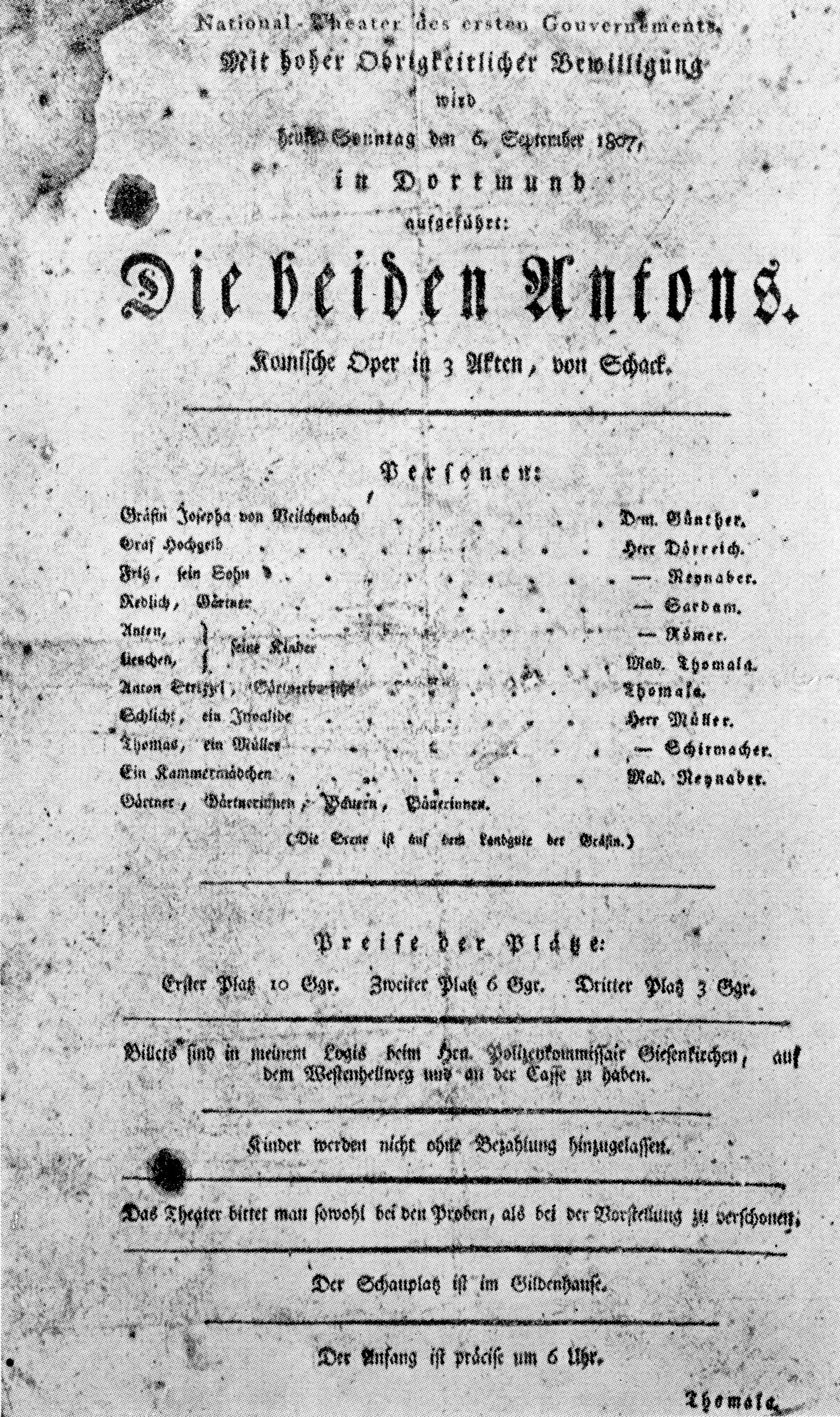 Dortmund, Oper, Programmzettel 1807